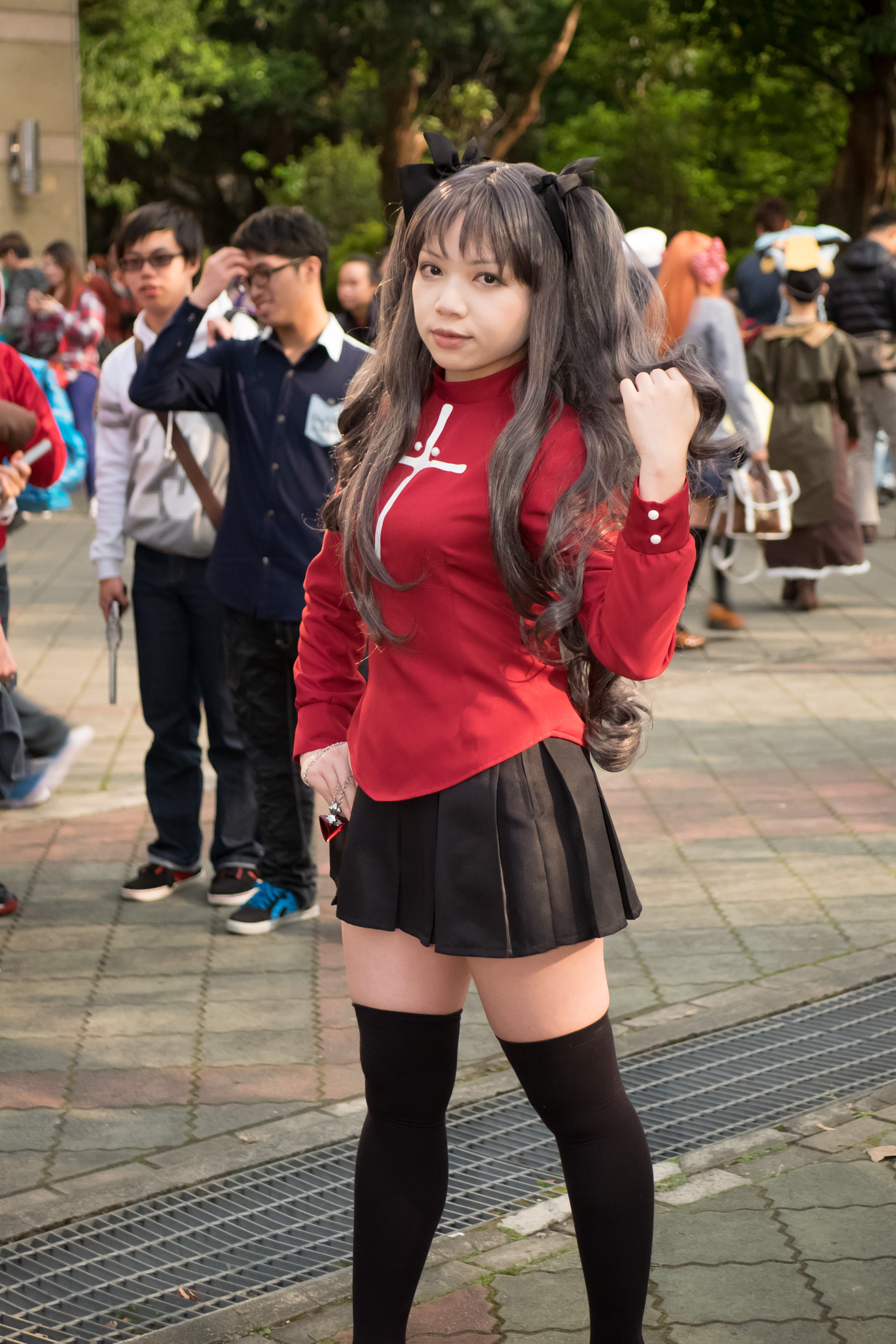 第39屆台灣同人誌販售會，《Fate/stay night》遠坂凜cosplayer。